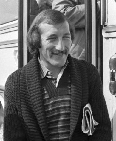 Patrick Revelli de l'AS Saint-Etienne.